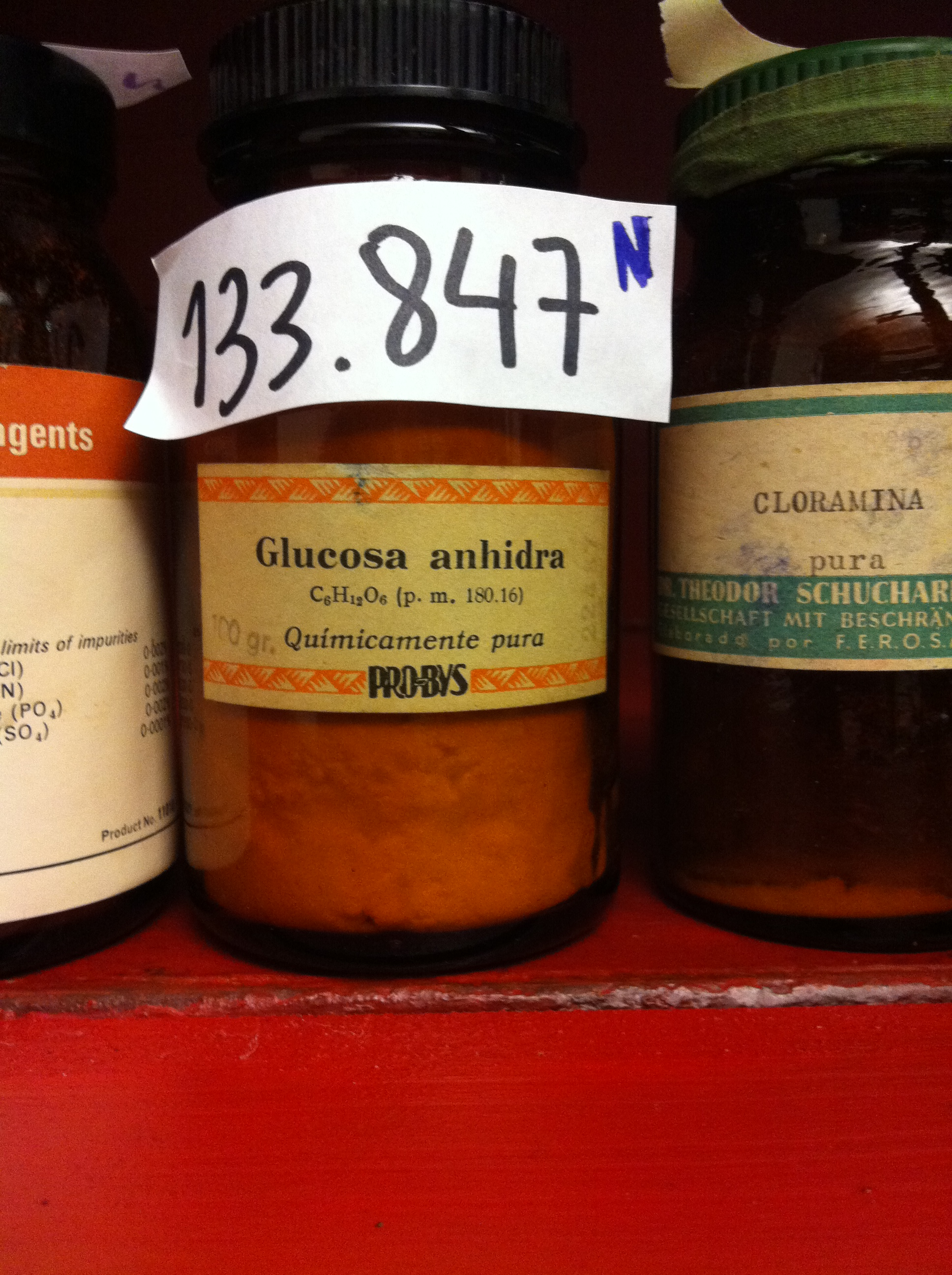 Glamwiki Girona desembre 2011